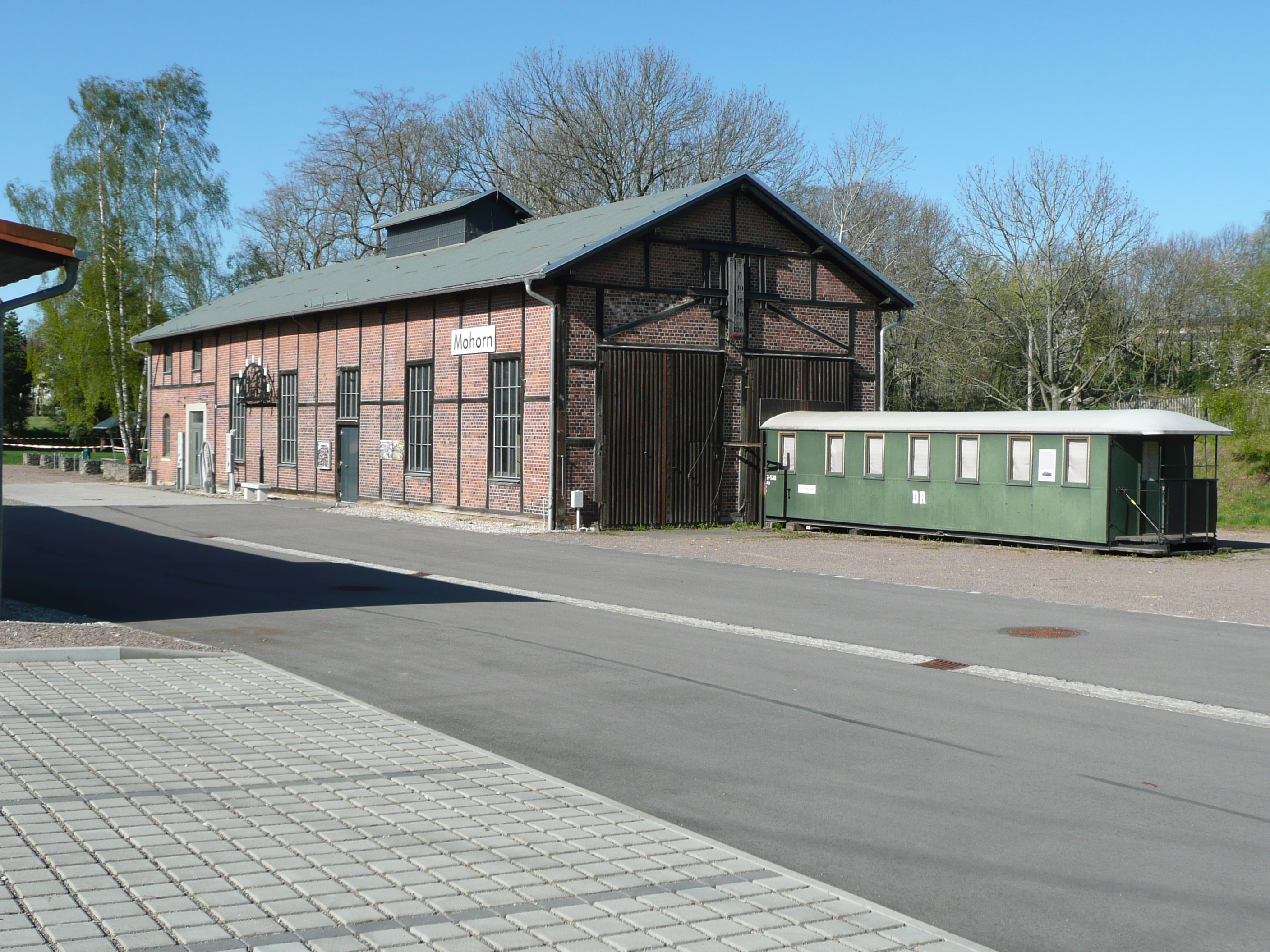 Ansicht des ehemaligen Lokschuppens in Mohorn